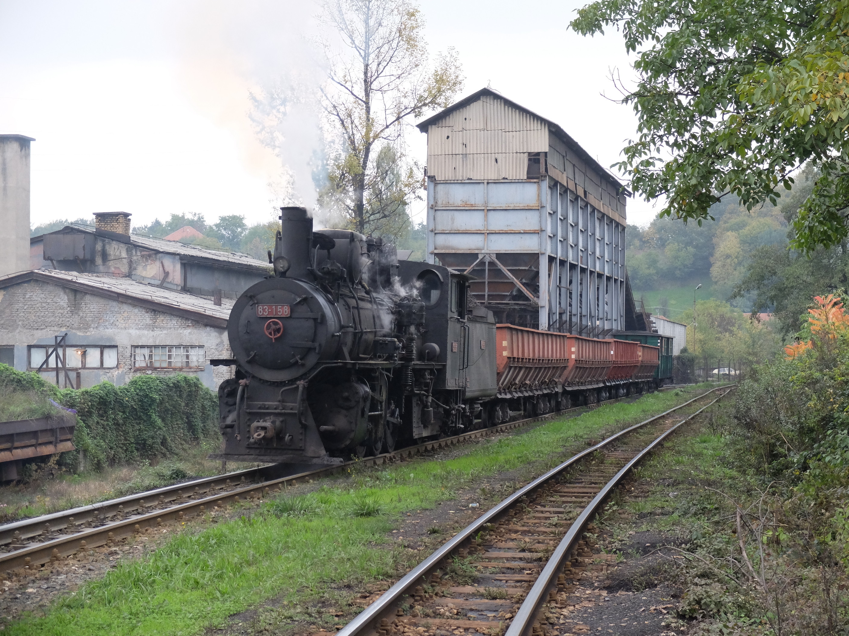 RMU Banovići 83-158 mit Sonderzug für die DGEG in Höhe der Lokomotivbekohlungsanlage des Depots.